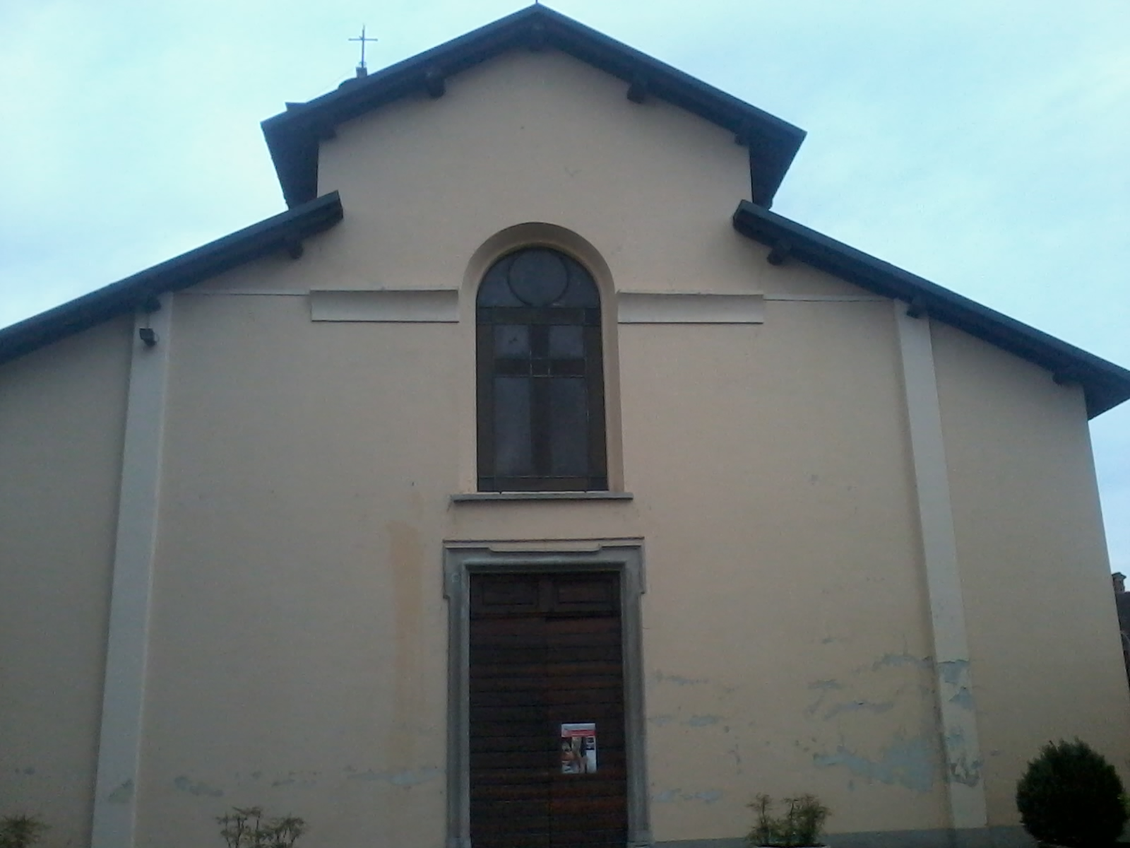 La chiesa parrocchiale di Sant'Andrea a Casterno - Robecco sul Naviglio (MI) - Italy